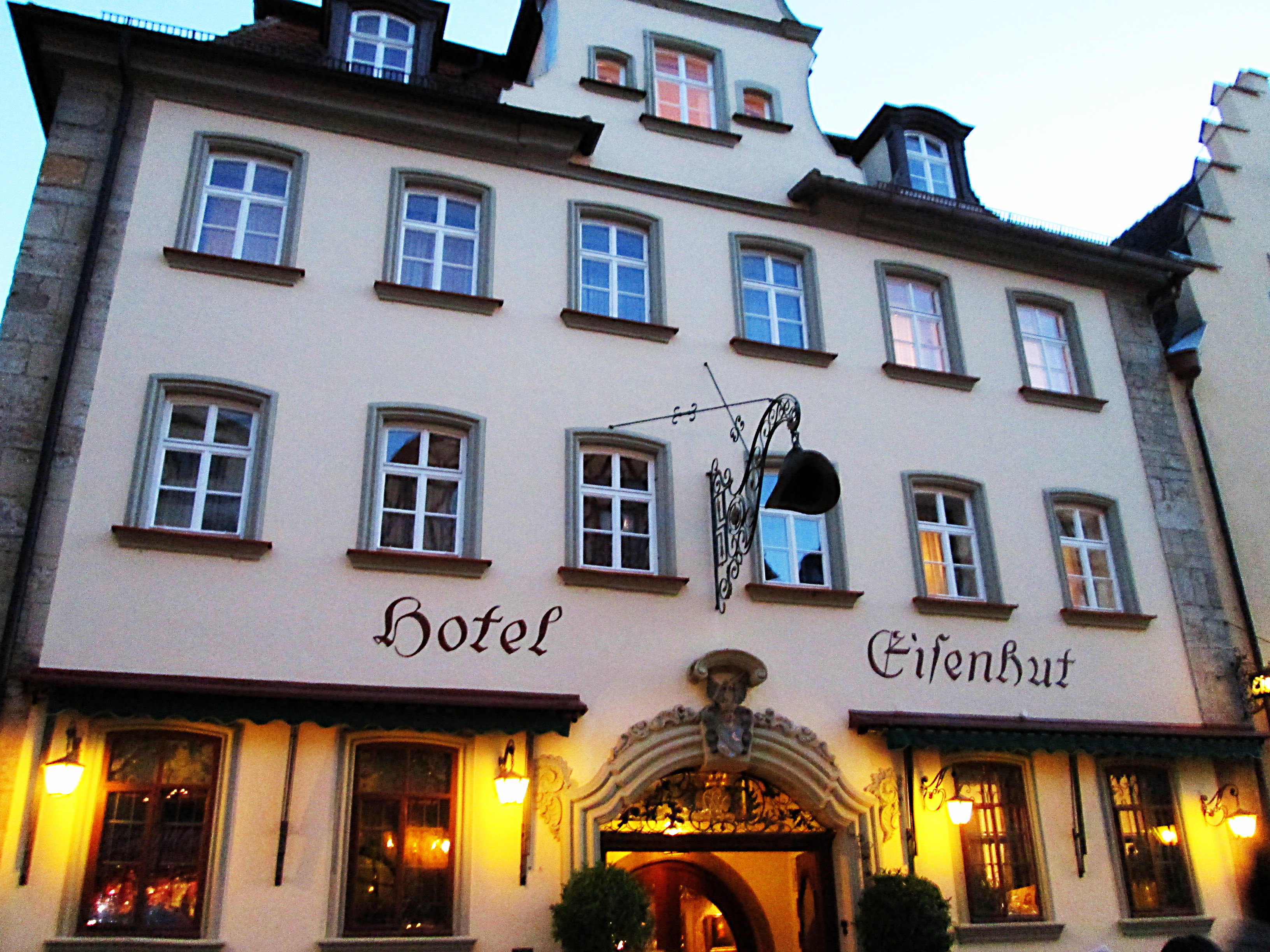 ホテル・アイゼンフート / Herrngasse 3-5/7, 91541 Rothenburg ob der Tauber